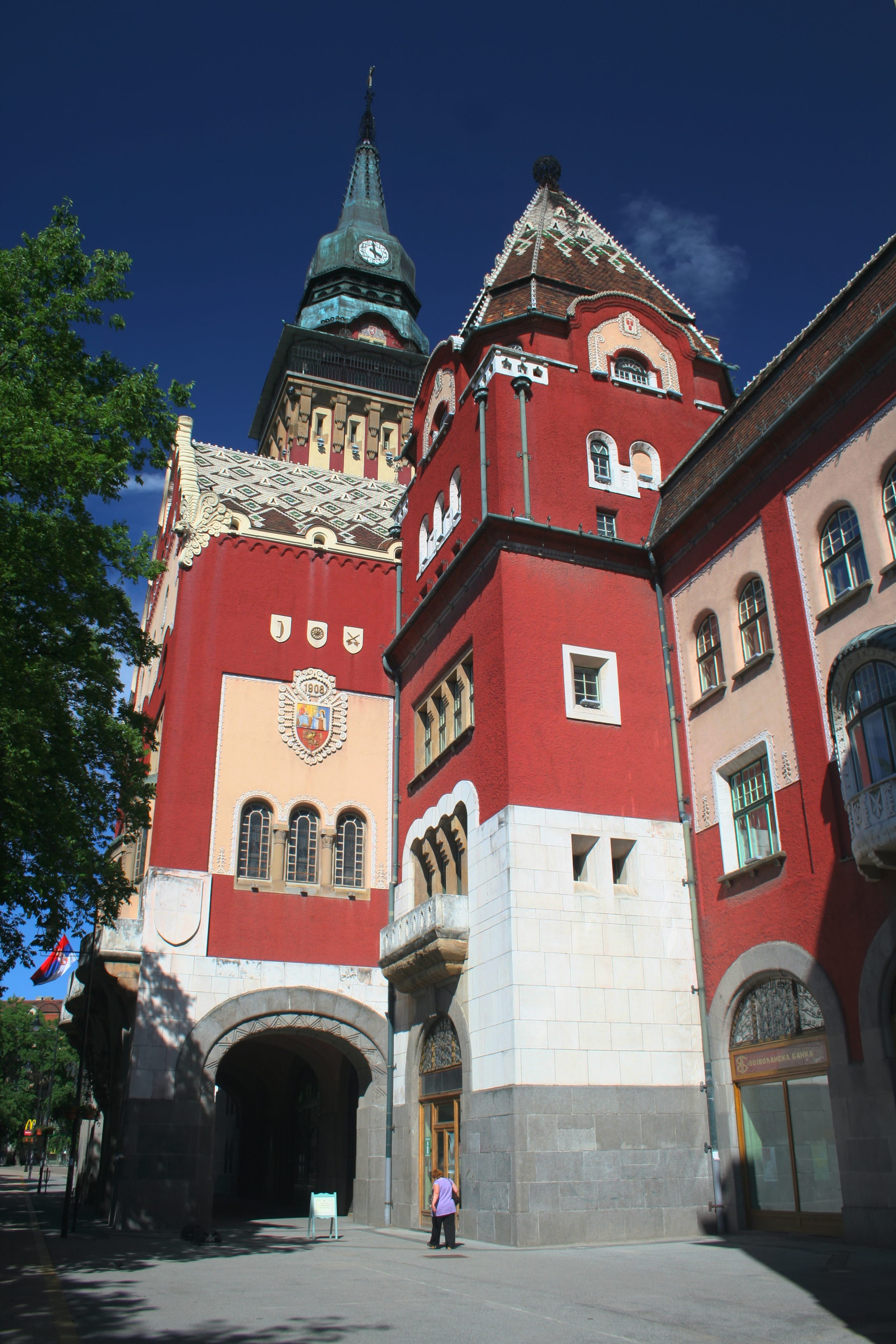 Gradska kuća u centru Subotice na trgu Slobode